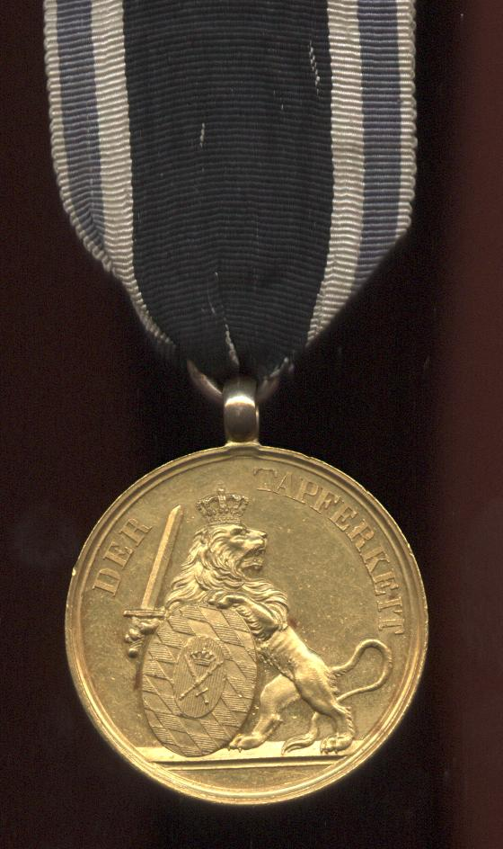 Bayerische Tapferkeitsmedaille, Gold, Rückseite